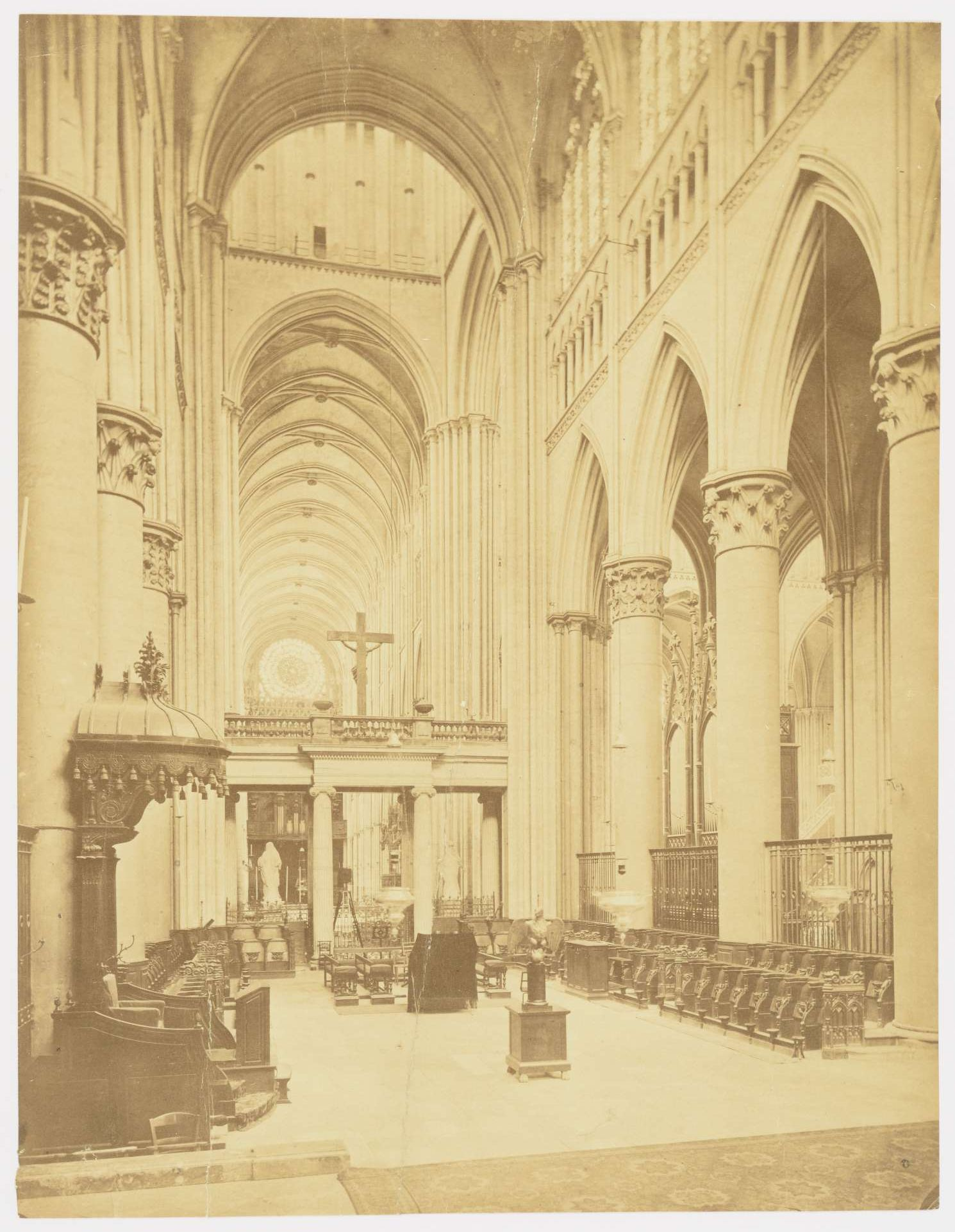 Jubé enlevé en 1884 : vue de la nef depuis le chœur en direction de la façade occidentale (le jubé surmonté d'un grand crucifix en second plan, trois grandes piles de part et d'autre avec les stalles et une chaire à gauche).Photographie du jubé enlevé en 1884. Échelle : 3 cm / 1 m. Photographie issue des dossiers de travaux de restauration des cathédrales (1802-1912), conservés aux Archives nationales (inventaire et documents numérisés consultables en ligne).